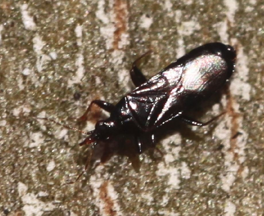 Wanze Dufouriellus ater am 17. Dezember 2019 am Stamm einer Platane in Walldorf/Baden